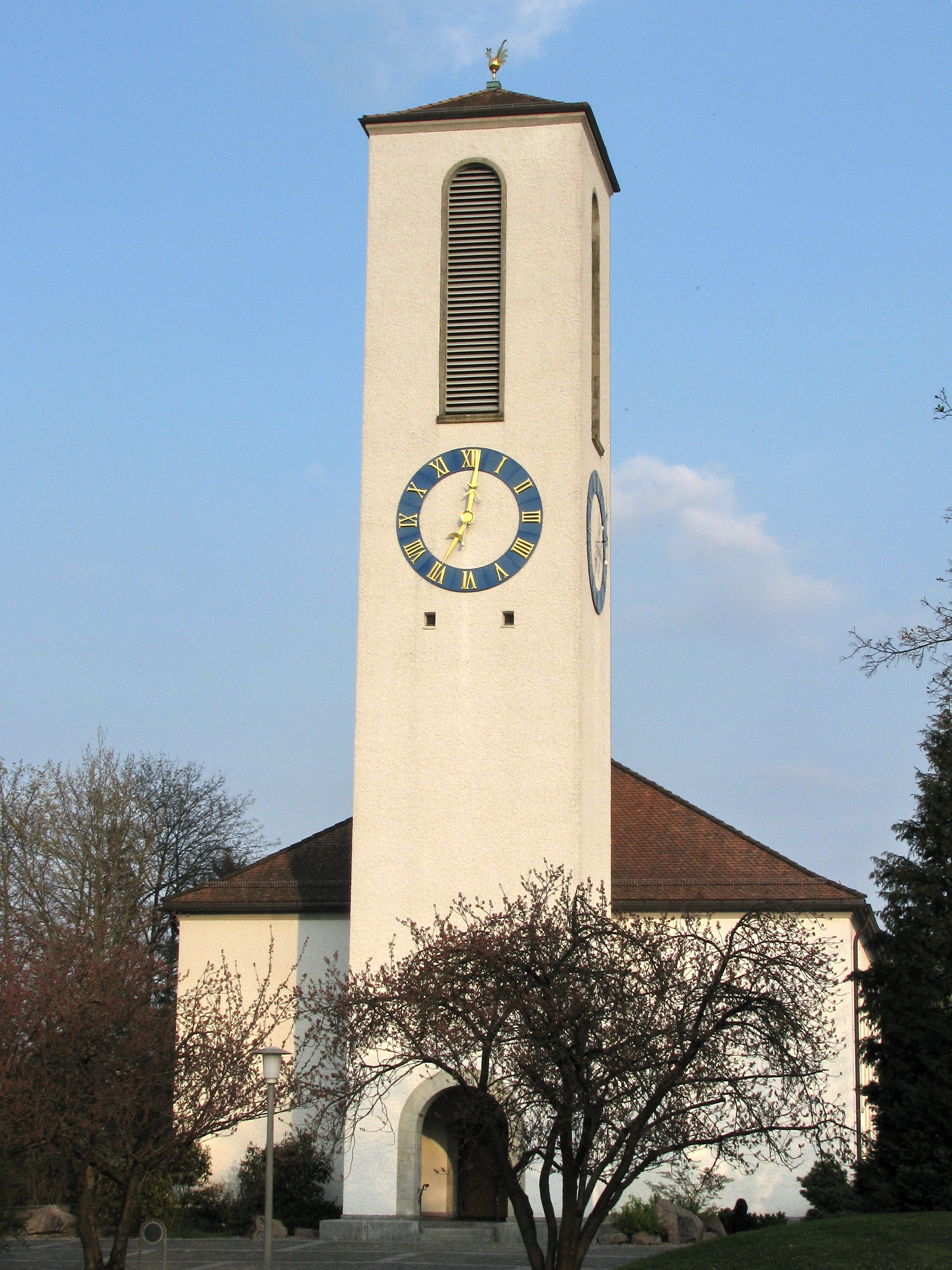 Reformierte Kirche in Dietikon (Switzerland)